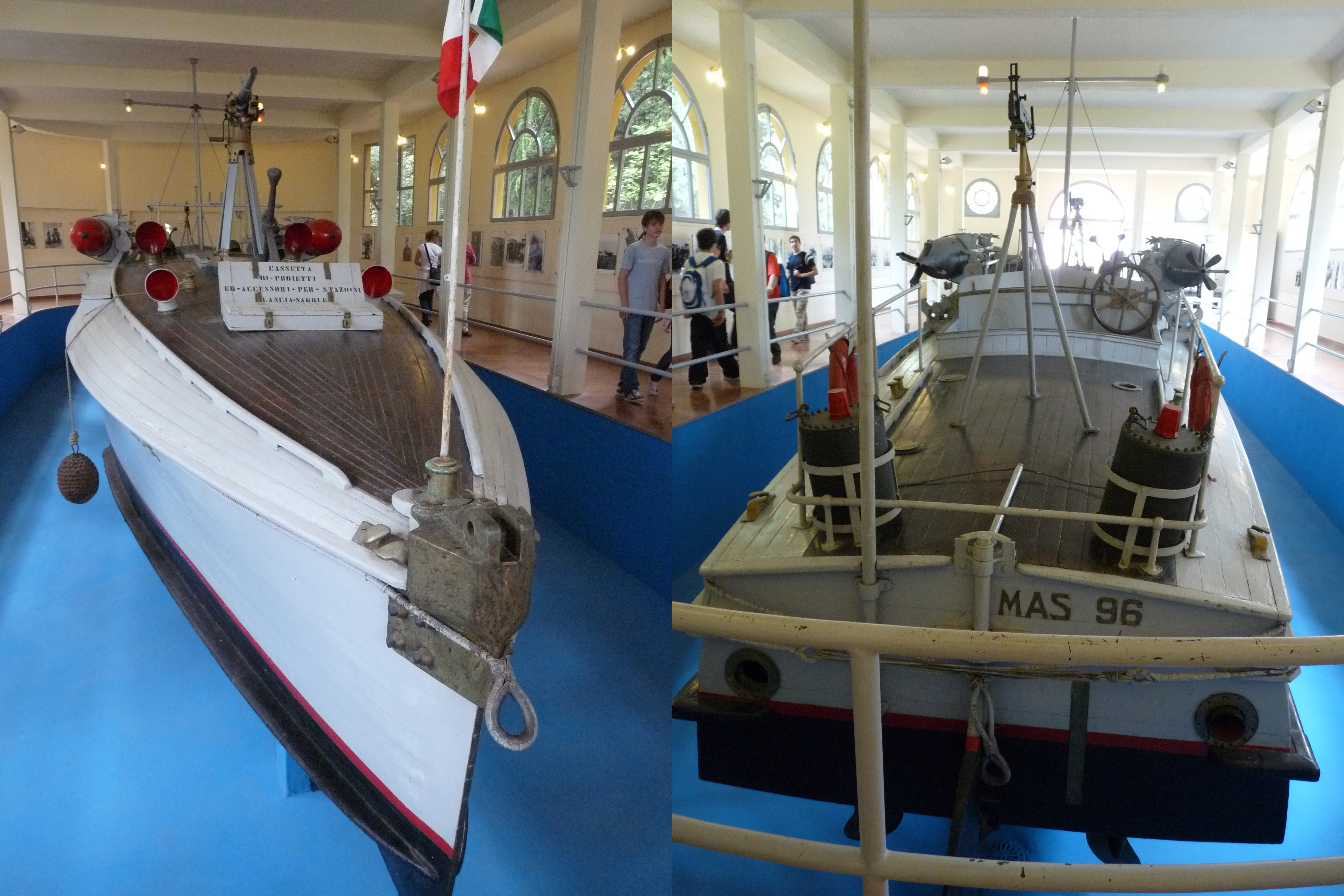 Il MAS 96 nel "Vittoriale degli Italiani" a Gardone Riviera.